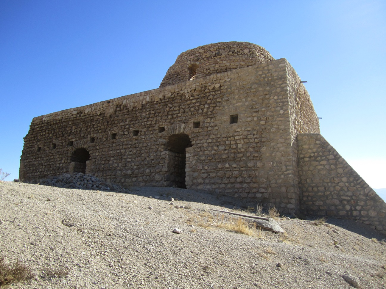 نمای از بیرون آتشکده اسپاخو در خراسان شمالی